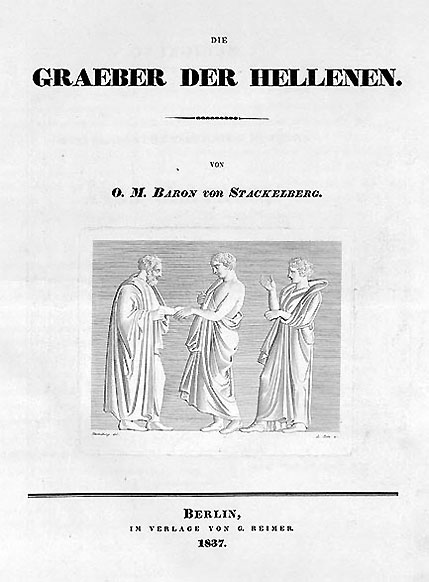 Deckblatt, Widmung und Stich von Baron Otto Magnus von Stackelberg "Die Gräber der Hellenen in Bildwerken und Vasengemälden" (Berlin, 1836/37)